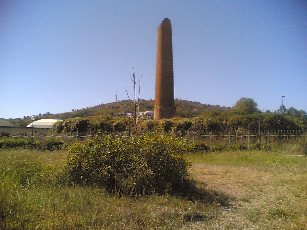 Carlo Iannuzzi, Opera Propria, La Fornace, GFDL e Creative Commons CC-BY-SA tutte le versioni (3.0, 2.5, 2.0 e 1.0), sono l'autore